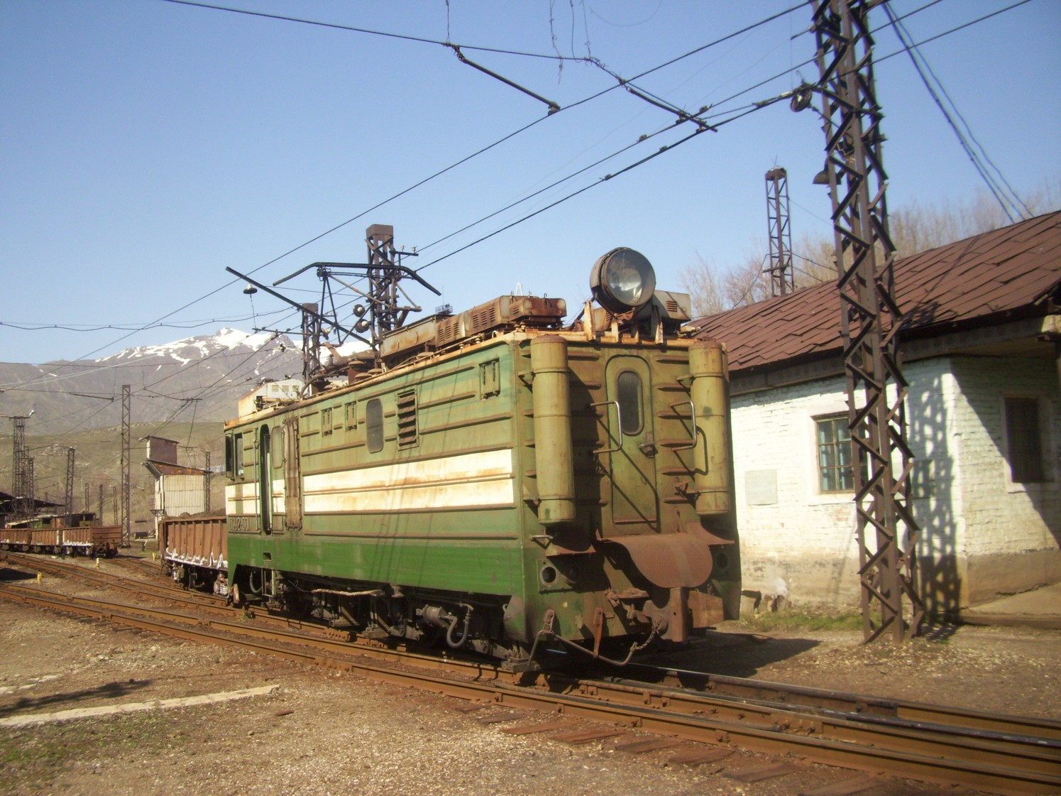 Секция электровоза ПЭУ2-001 на манёврах в Текели, Казахстан